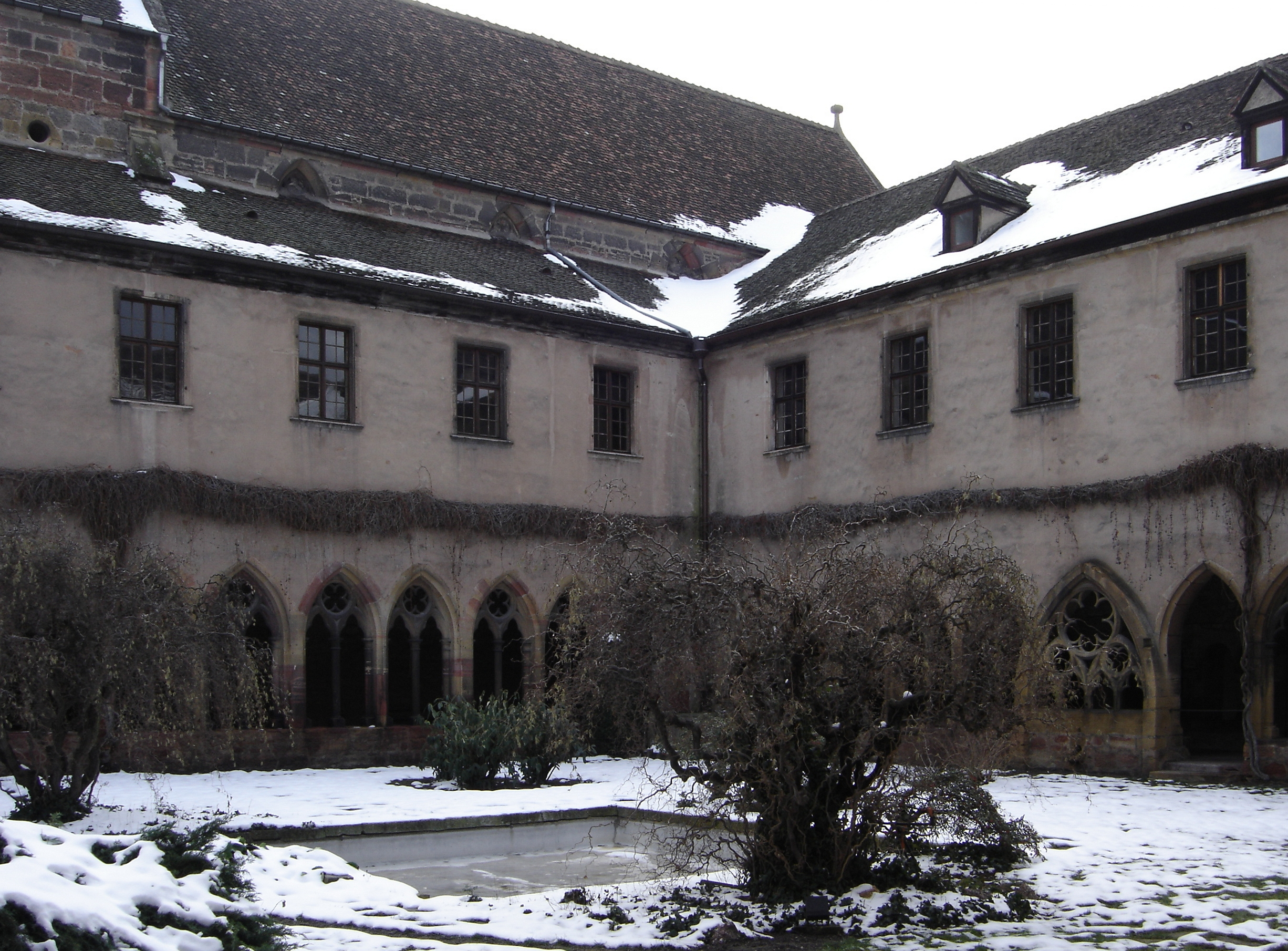 Museum Unterlinden, Colmar, France